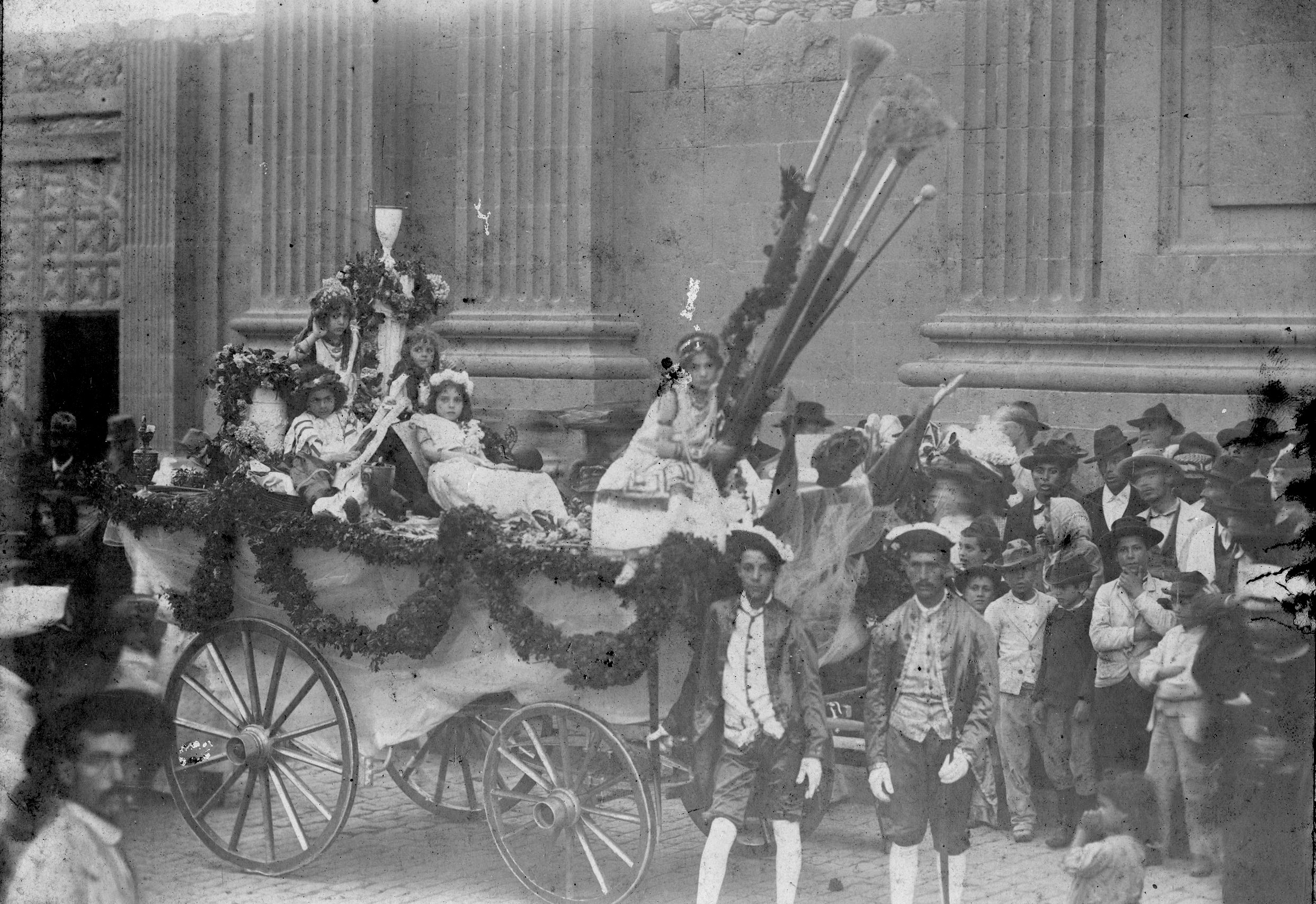 Retrato en la cabalgata de carnaval. Las Palmas de Gran Canaria (Gran Canaria). Islas Canarias, España.